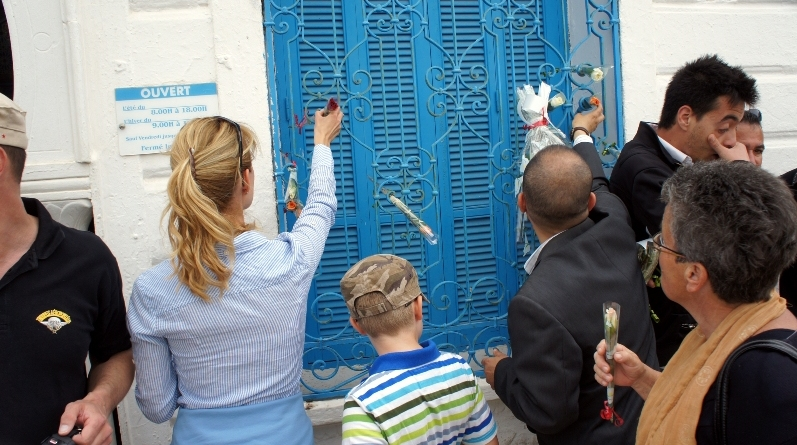 10 Jähriges schweigen sind endlich gebrochen ! Mitgefühl und Solidarität mit den Familien der Opfer.